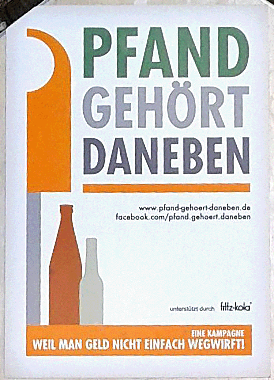 Mülleimer in Bielefeld mit Werbeaufkleber für die Aktion "Pfand gehört daneben". Aufkleber zeigt Unterstützer fritz-kola.